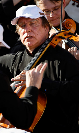 Народный артист Российской Федерации Сергей Павлович Ролдугин